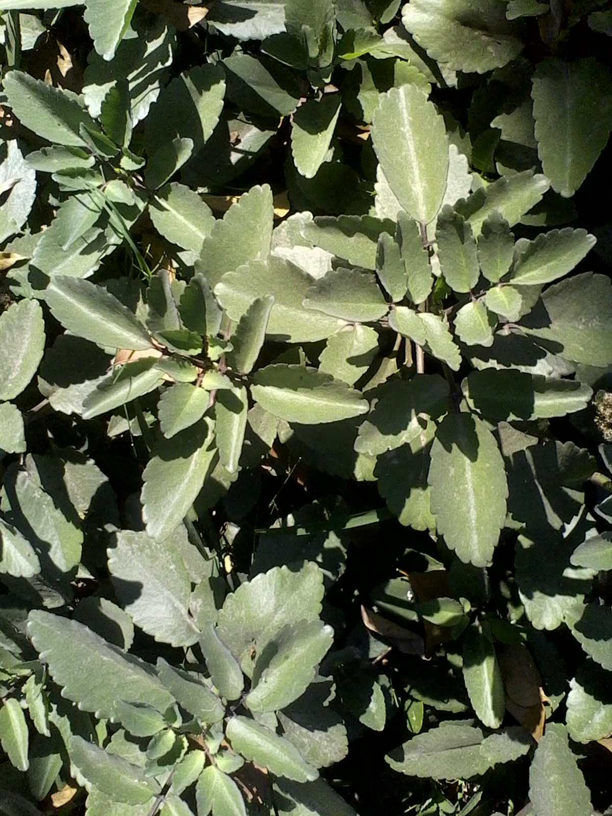 পাথরকুচি পাতার বাগান